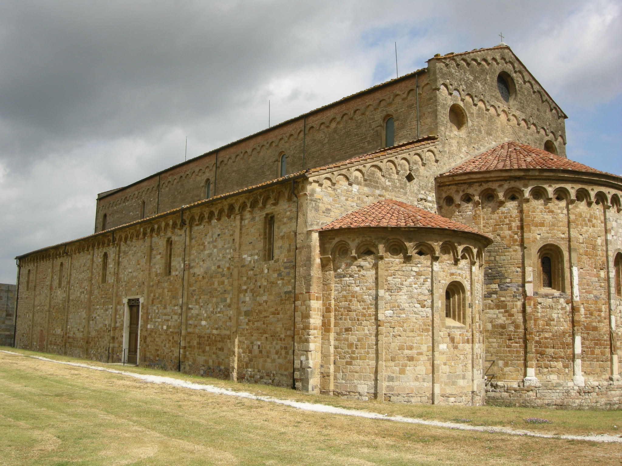 Basilica di san piero a grado